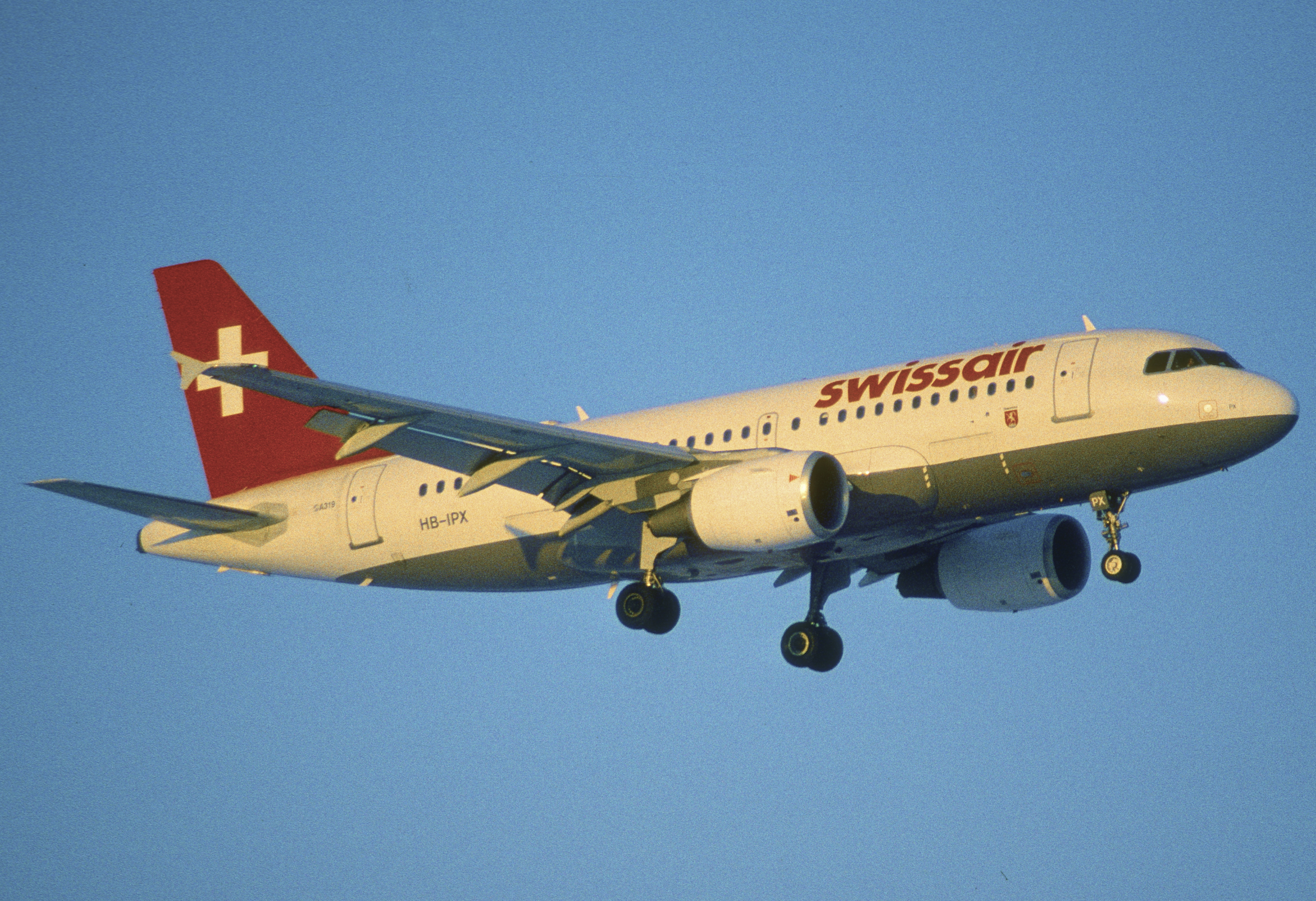 1ak - Swissair Airbus A319-112; HB-IPX@ZRH;06.12.1997